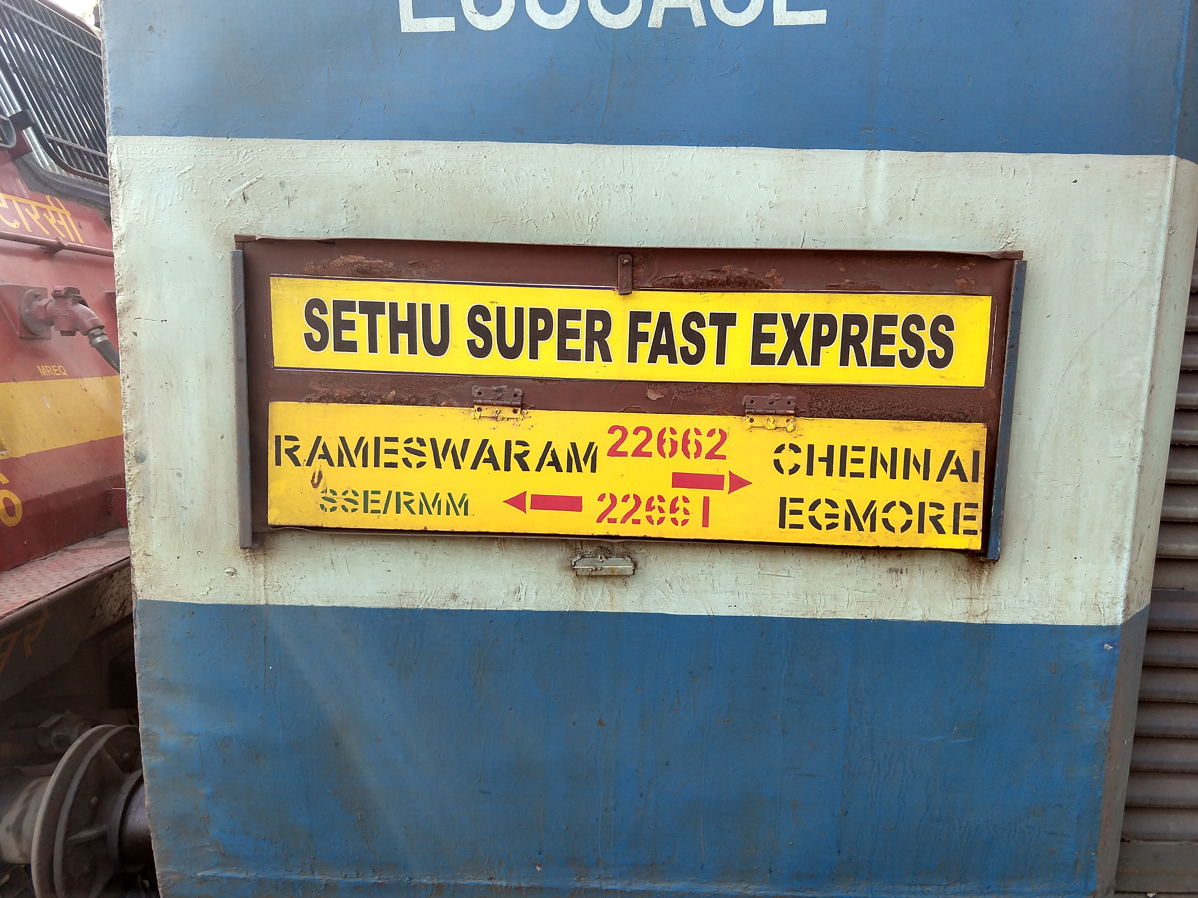 Name plate of Sethu SF Express